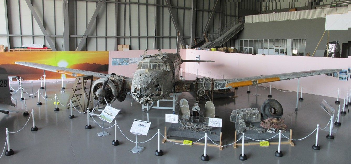 青森県立三沢航空科学館展示／写真３枚手作業合成